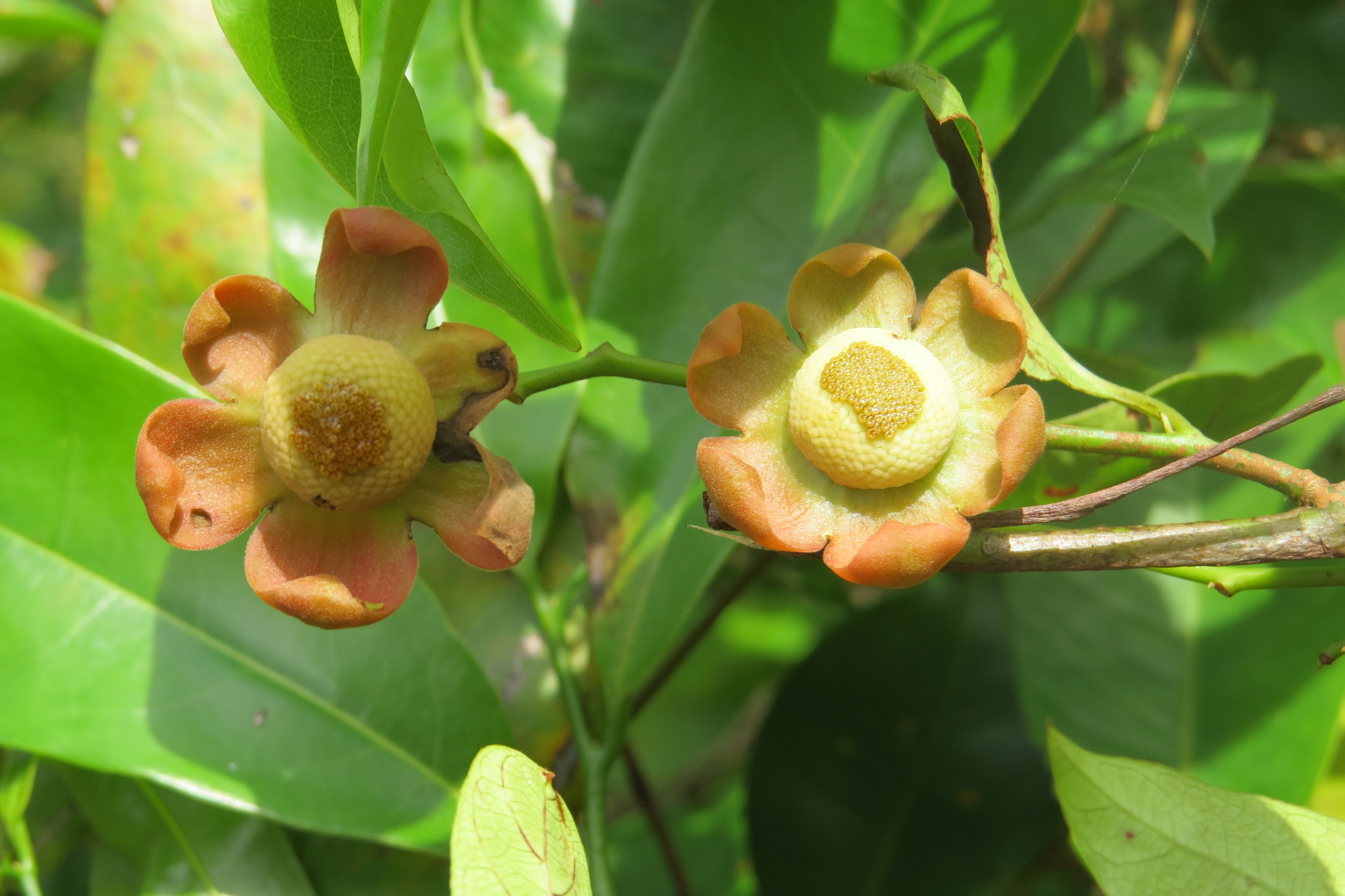 Photos by Vinayaraj